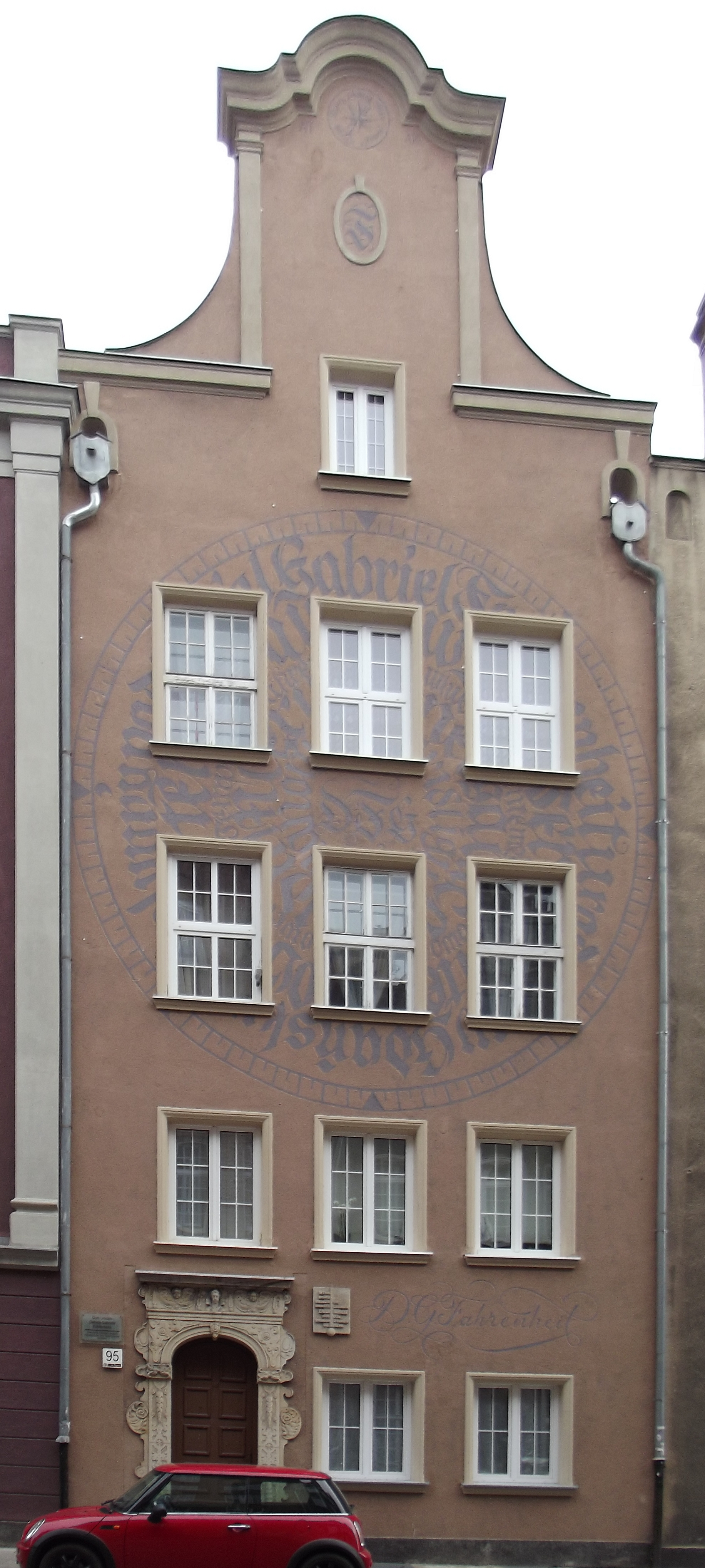 Gdańsk - kamienica w której urodził się Daniel Gabriel Fahrenheit Hundegasse (ul. Ogarna, obecnie nr 95) twórca Skali Fahrenheita powszechnie używanej w USA, Kajmanach, Bahamach oraz Belize.